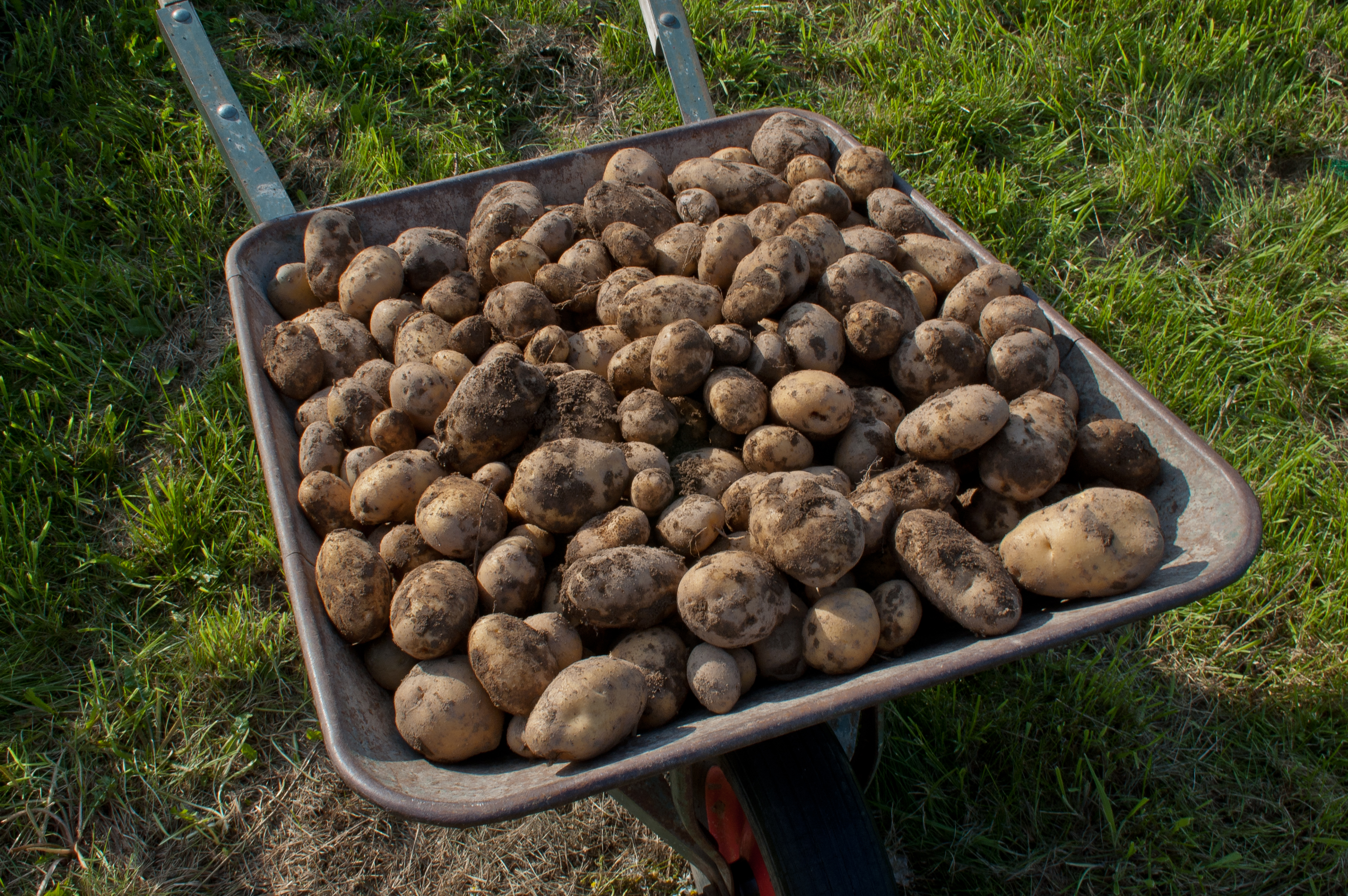 Kartoffelernte von Hand: Ernteergebnis von 33 Plfanzkartoffeln, Sorte Linda, auf bindigem Sandboden, Düngung: lediglich Patentkali und Hornspäne, keine Behandlungen gegen Krautfäule.